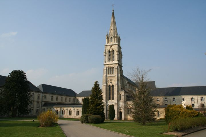 Abbaye Notre-Dame de La Trappe, Soligny (Orne, France). Siège de la réforme de l'Ordre cistercien par l'Abbé de Rancé en 1664 (Ordre cistercien de la stricte observance, ou "trappistes"). Photo : PY.Stucki, 22/04/2006.